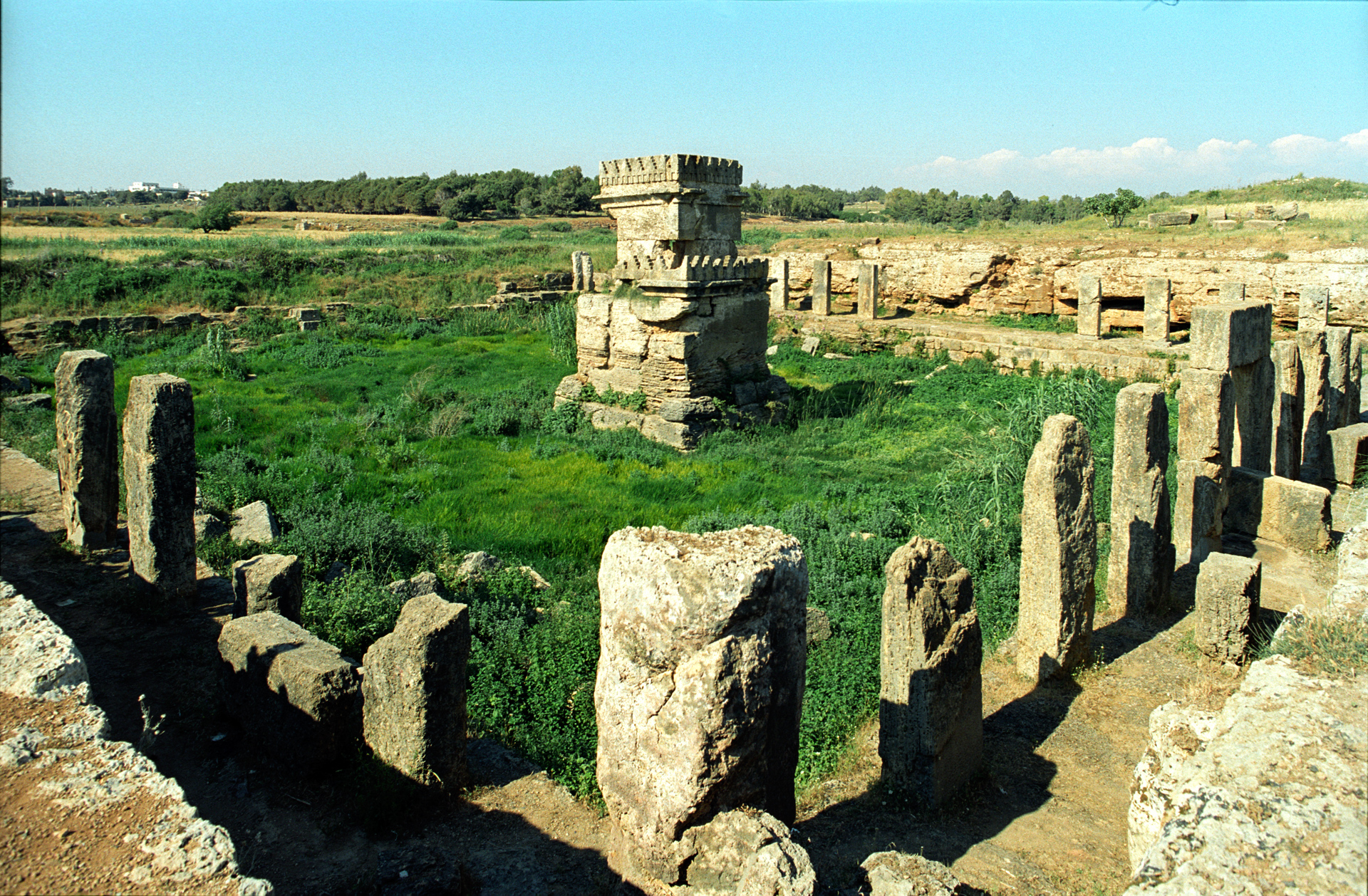 Syria, Amrit